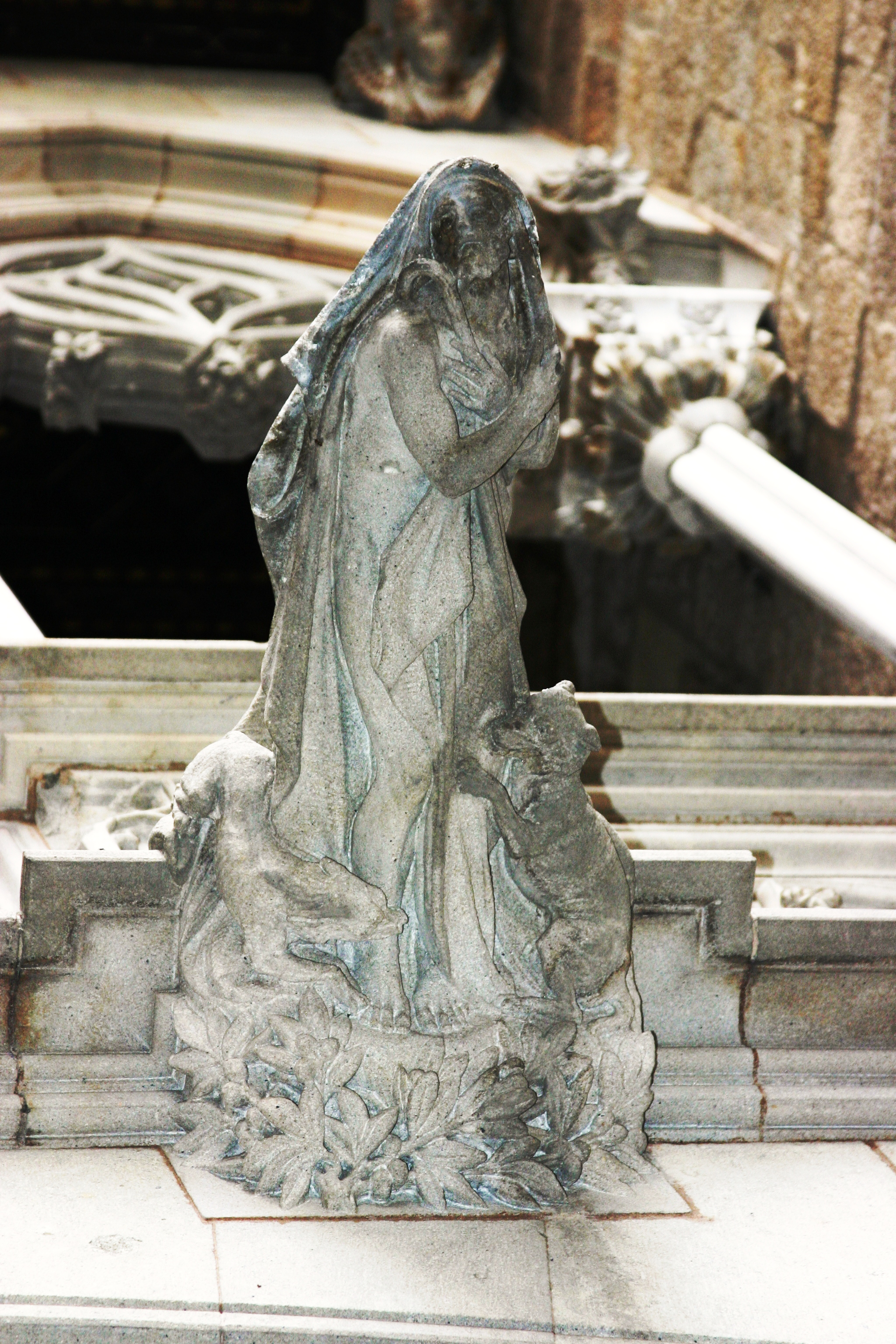 Carrer del Bisbe